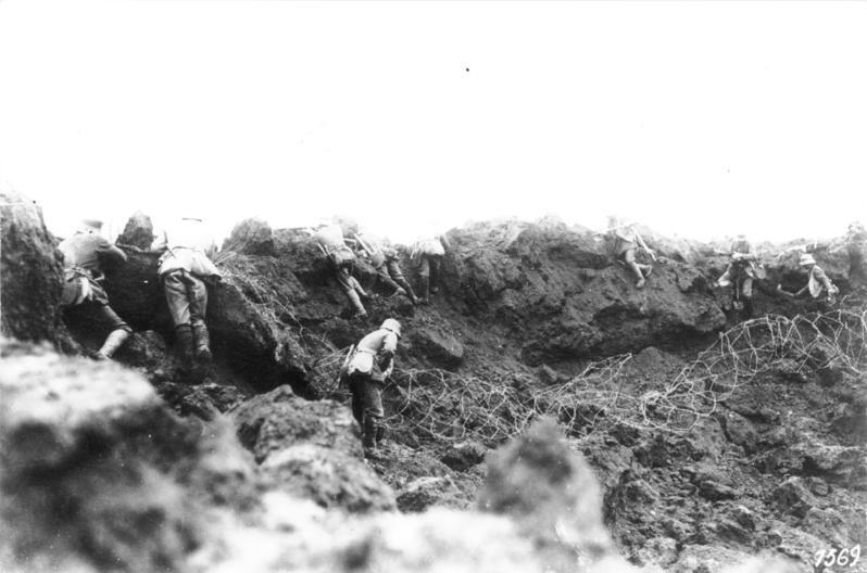 [1.Weltkrieg] [Frankreich] Kämpfe bei Ripont (Champagne); deutscher Sturmtrupp in Stellung am Rand eines kurz vorher besetzten Minentrichters; Frühjahr 1917 Information added by Wikimedia users.